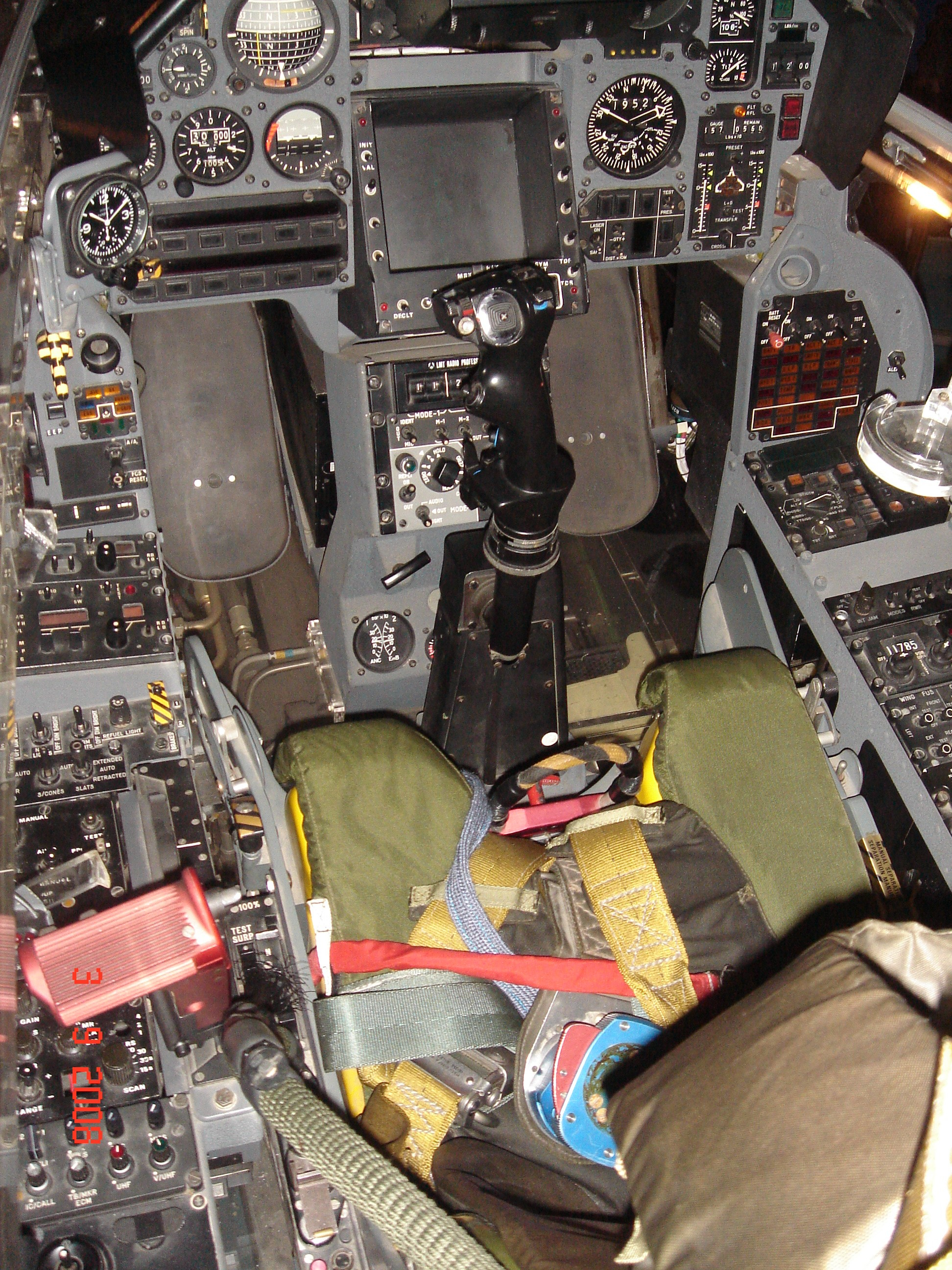 Photo prise au hangar suite à un vol